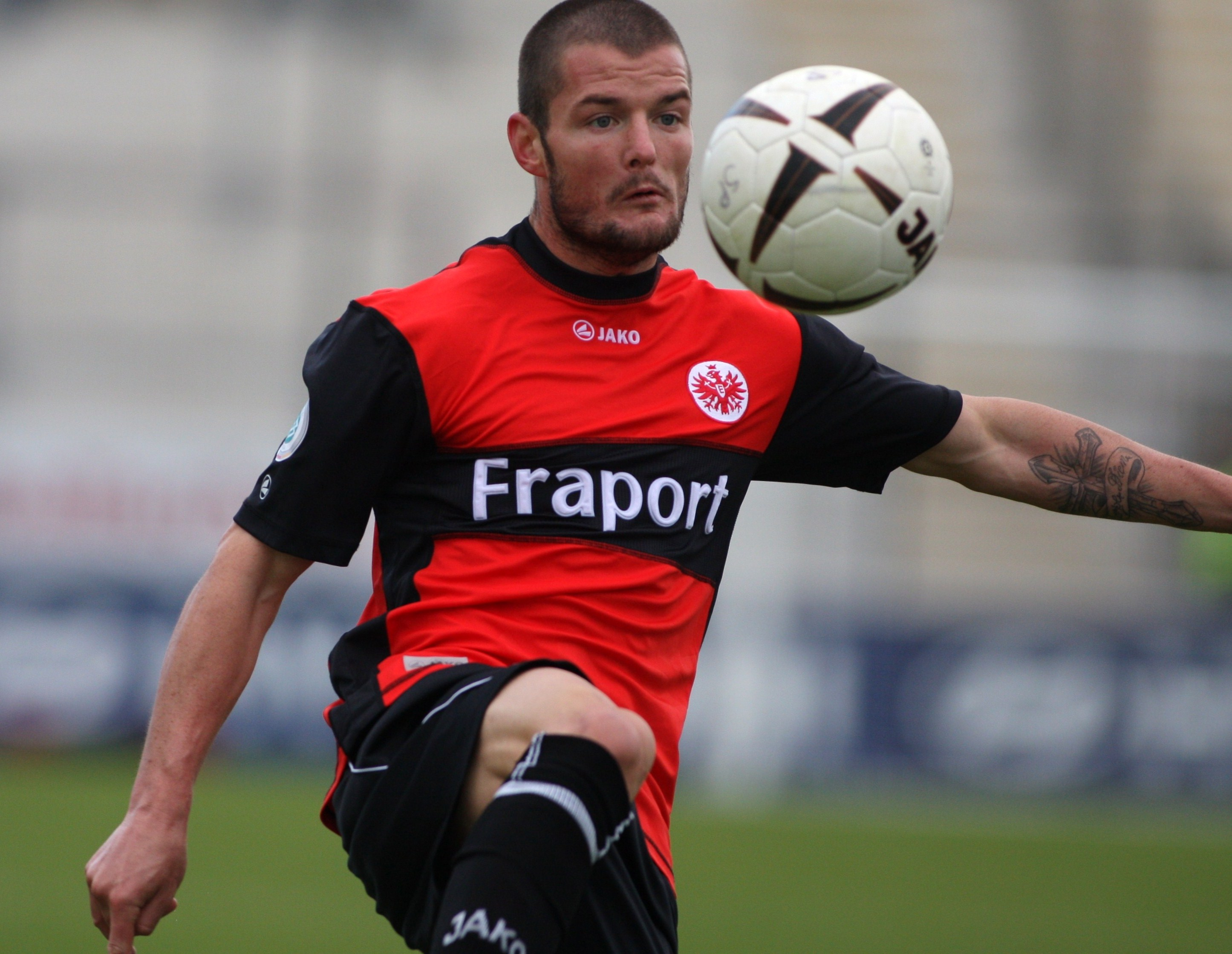 Eintracht Frankfurts Marcel Heller 2009